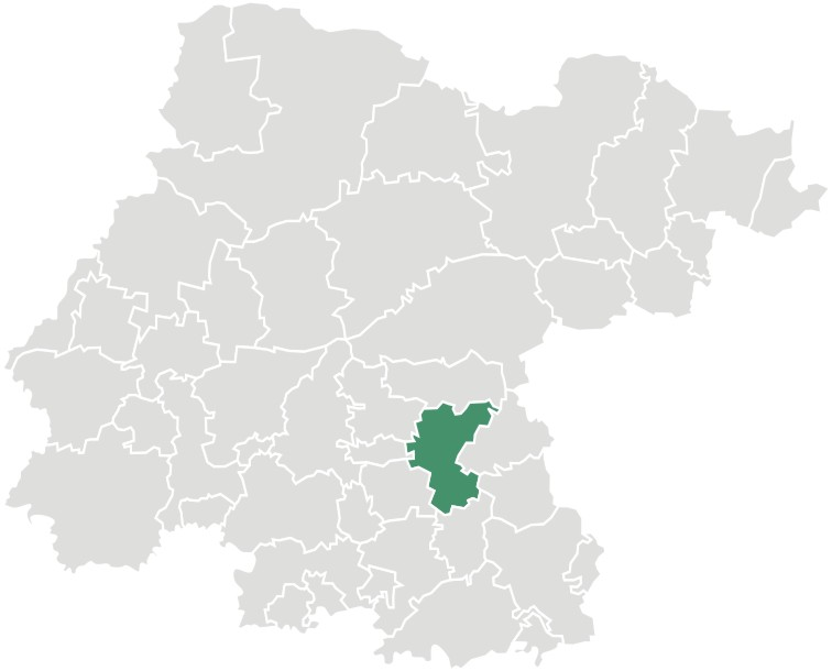 Mapa del municipio de Celaya en el estado mexicano de Guanajuato